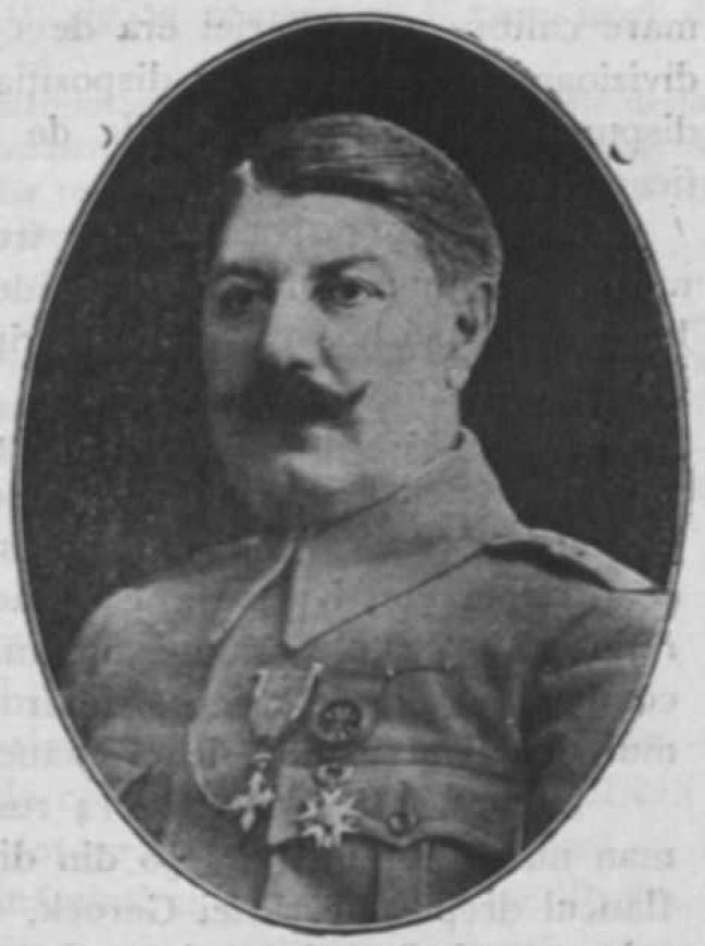 General Alexandru Margineanu comandant al Diviziei 3 Infanterie, România, în Primul Război Mondial